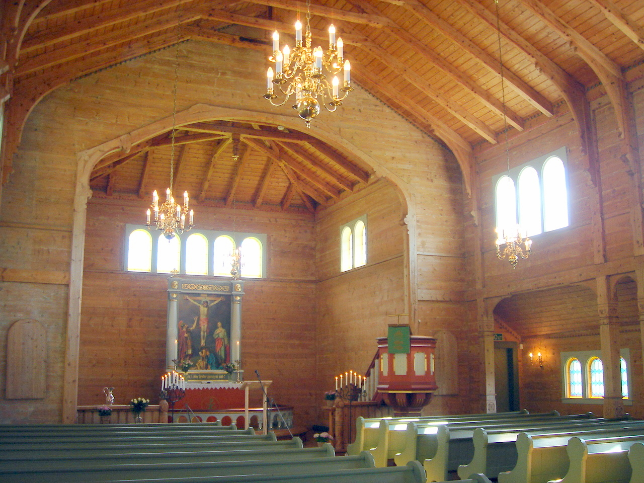 Sæle kyrkje, Sæle church